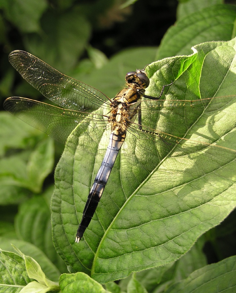 Orthetrum albistylum speciosum (Männchen) in einem verwilderten Garten zwischen Reisfeldern in Kusatsu (Shiga-ken, JP).